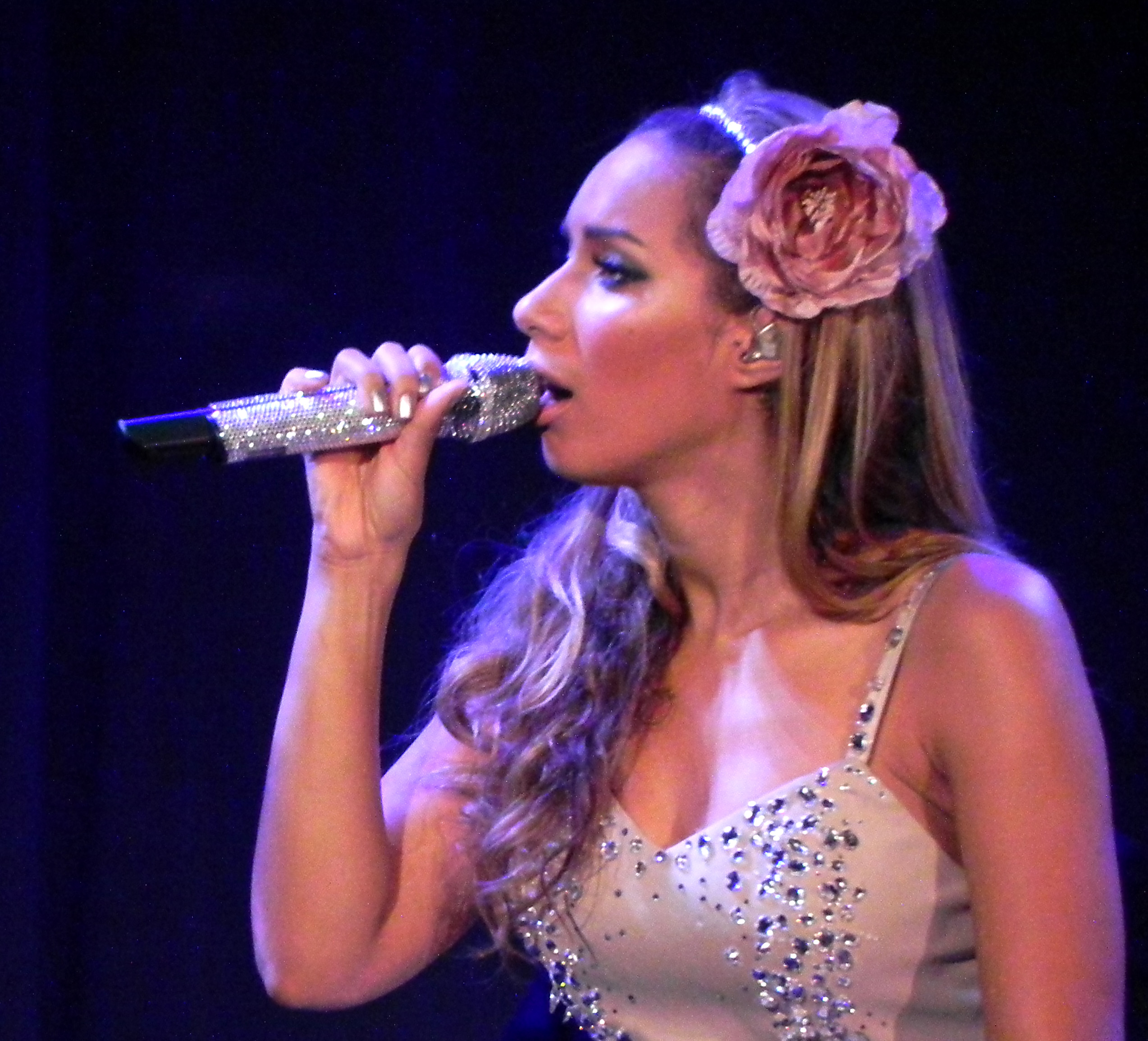 Leona Lewis durante a sua turnê "The Labyrinth" (em português: O Labirinto)